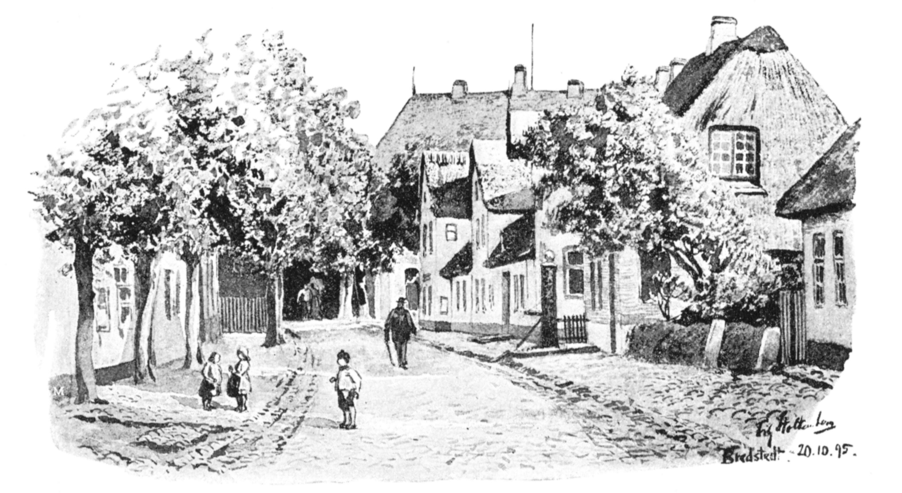 Bredstedt um 1895, Zeichnung von Fritz Stoltenberg.